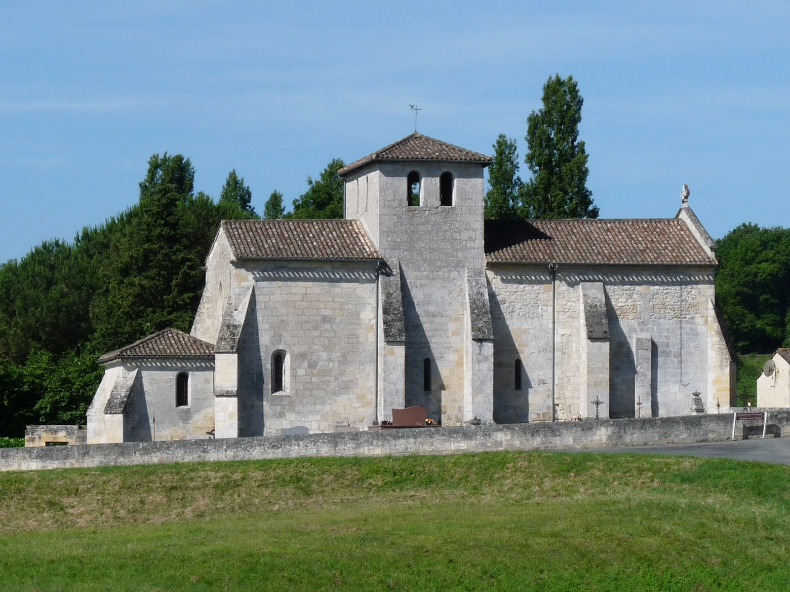 Eglise de St-Cibard, Gironde, France